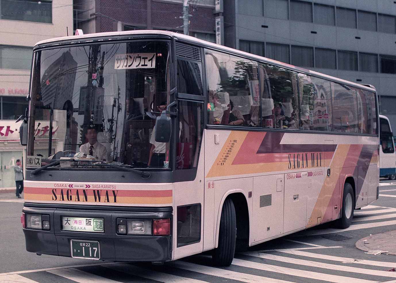 西日本鉄道 高速バス SAGANWAY